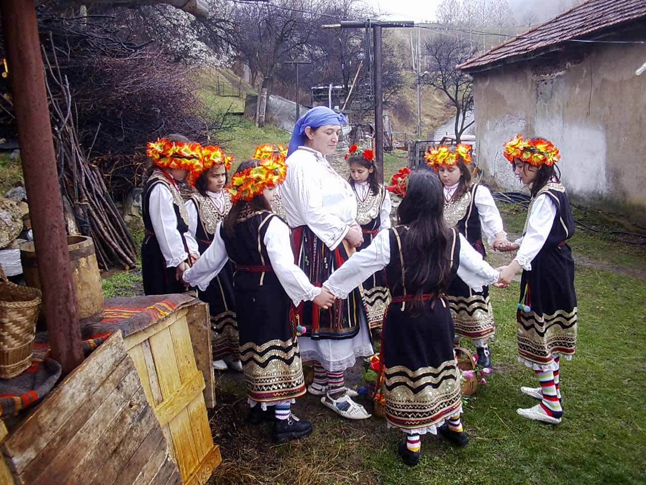 Лазаровден - Гара Бов